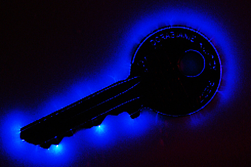 Kirilanowska fotografia klucza